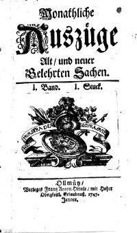 Monatliche Auszüge alt und neuer gelehrten Sachen (Vol.1) Ollmütz: Frantz-Anton Hirnle; 1747